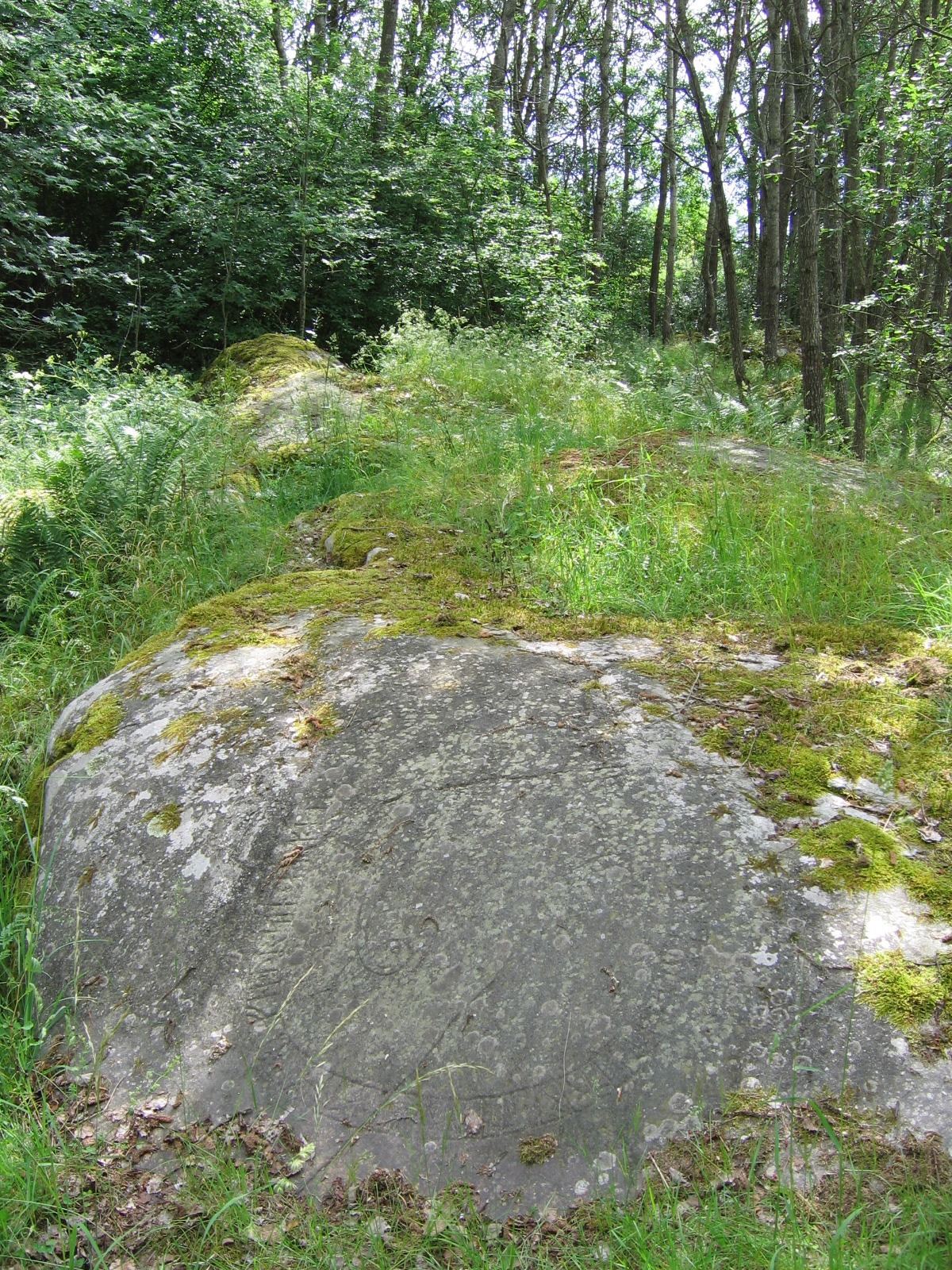 rune flats at Hargs bro, Uppland, Sweden.